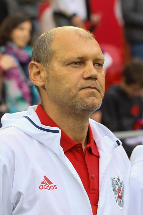 Россия - Чили